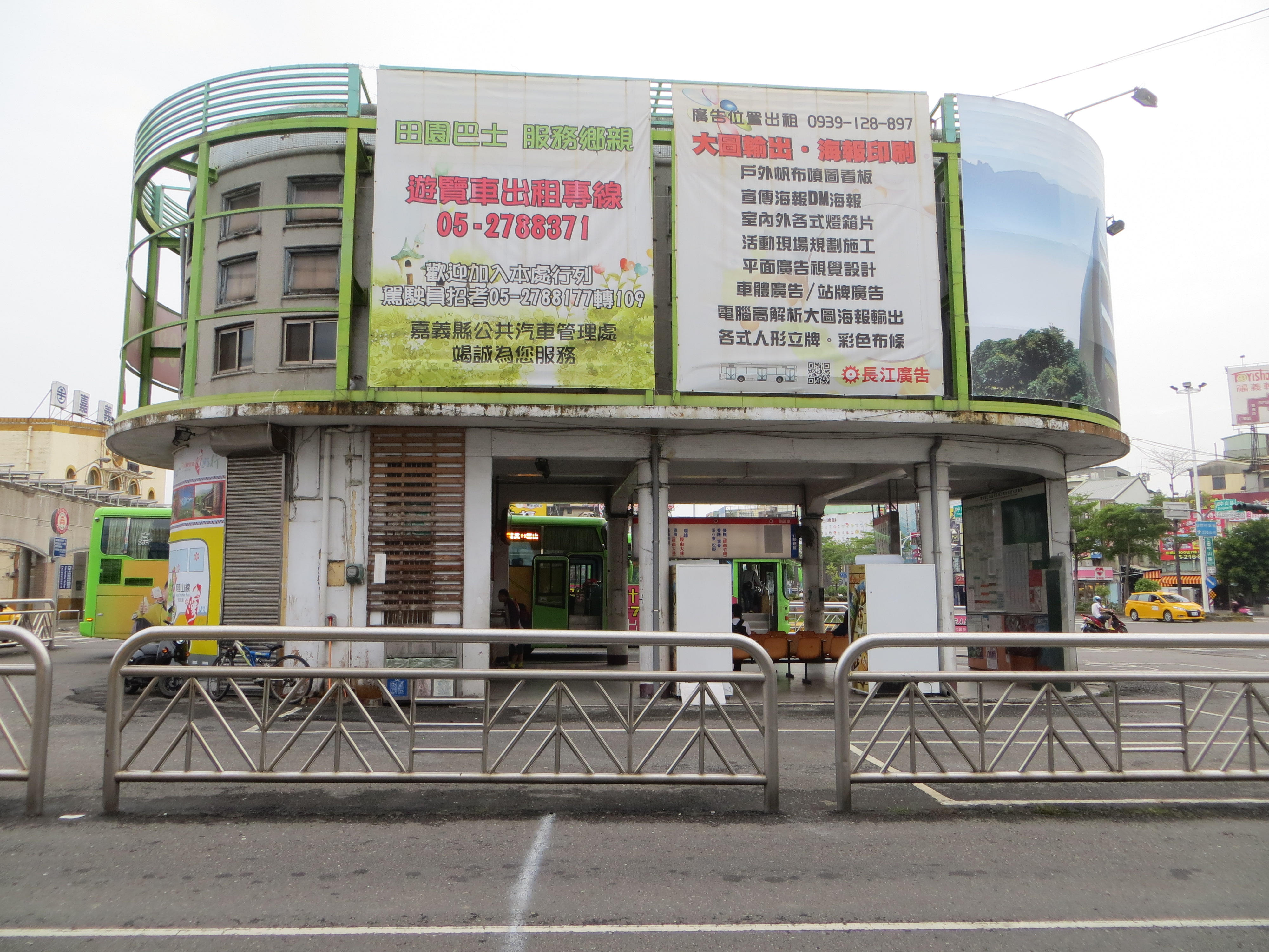 2015年7月8日，嘉義縣公車處嘉義站背面一景，左側為台鐵嘉義火車站前站，右側為中山路。